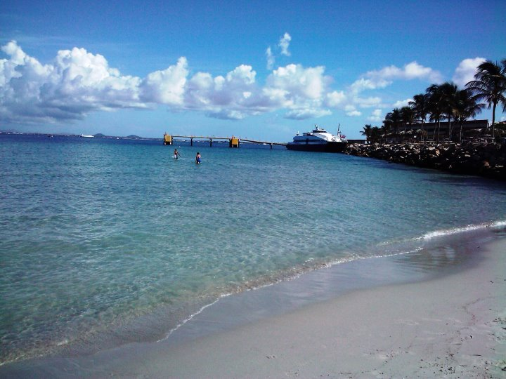 Pampatar isla de Margarita, estado Nueva Esparta - Venezuela (2011)